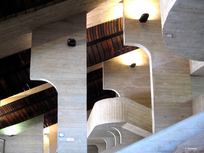 L'intérieur de la bibliothèque des sciences et des technologies à Louvain-la-Neuve en août 2009.